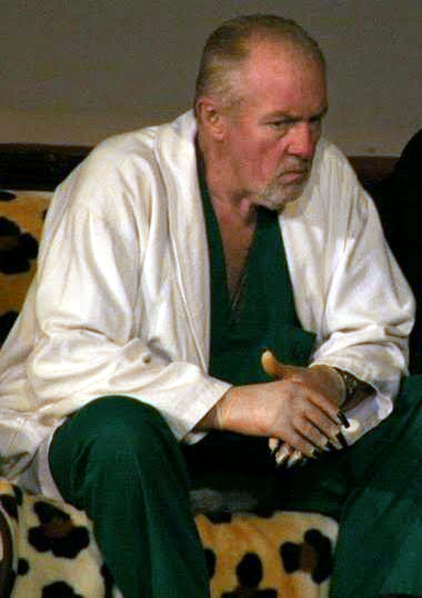 Vladimir Găitan în Poker - Teatrul de Comedie